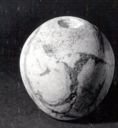 Mace; Stone-Implements